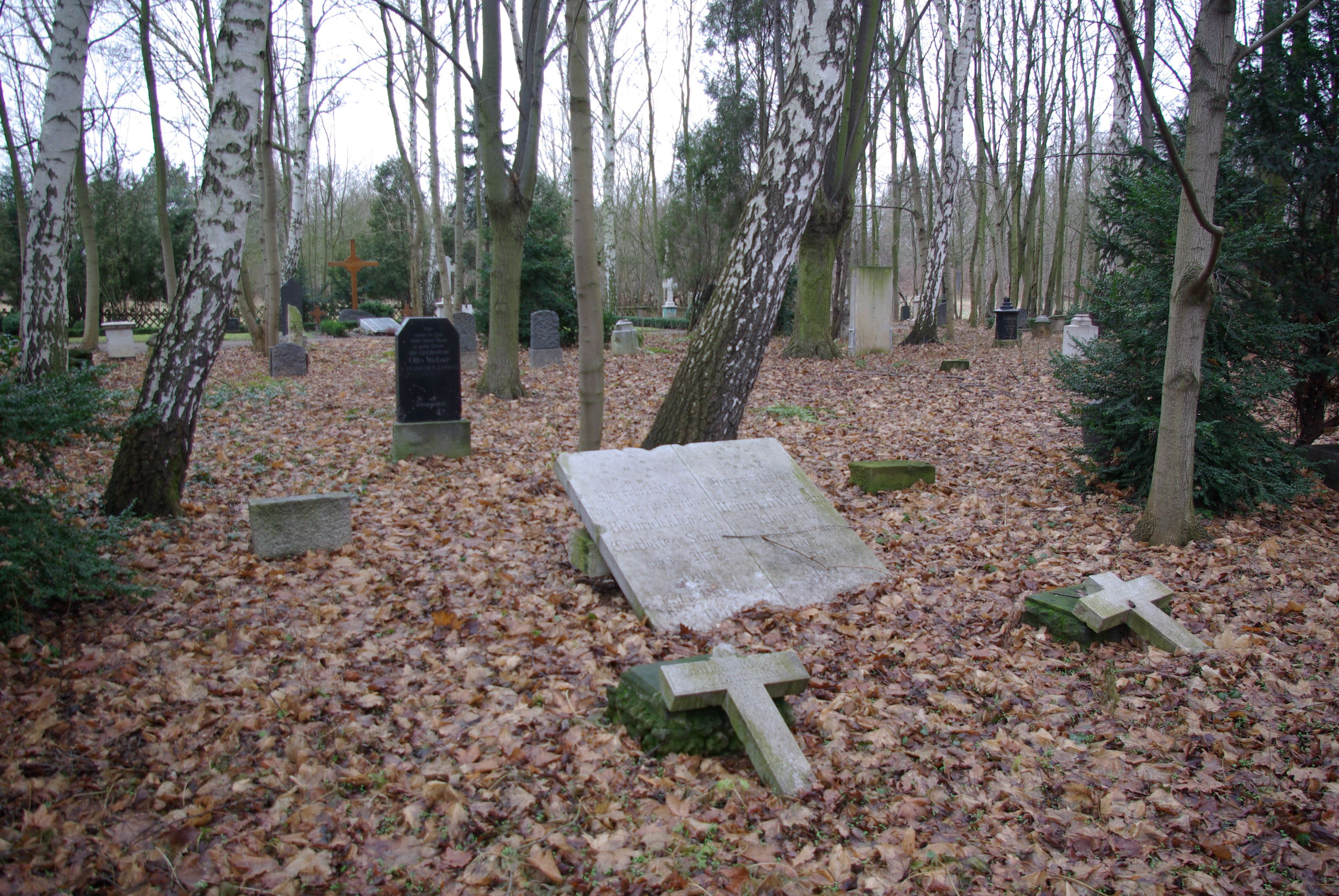 Küstriner Vorland in Brandenburg. Der Friedhof wurde 1816 angelegt. Der Friedhof steht unter Denkmalschutz.